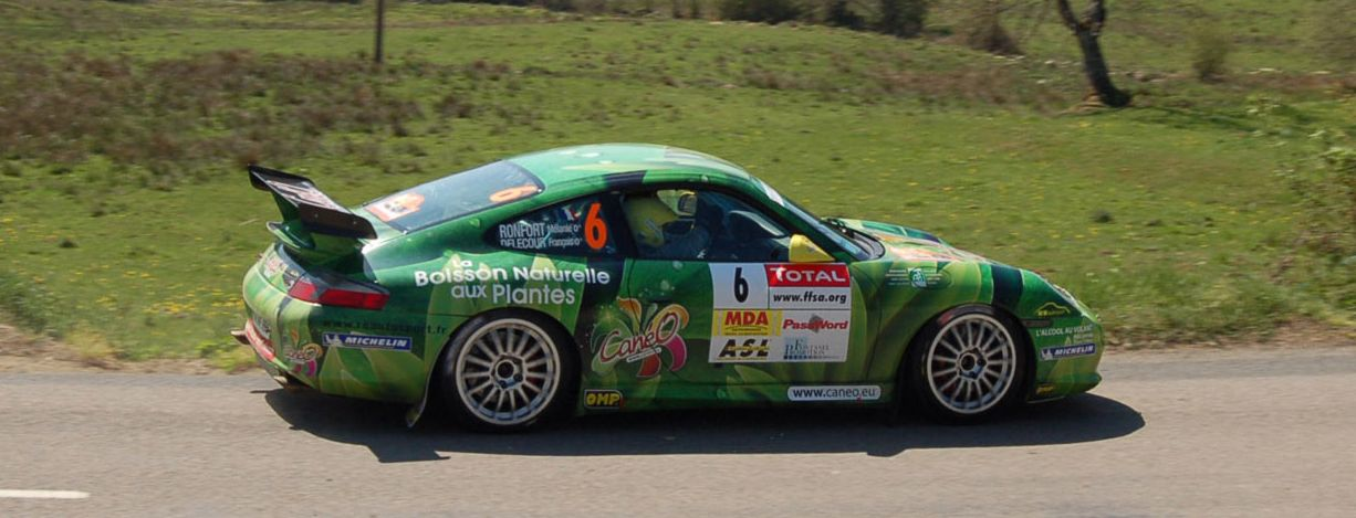 Delecour-Ronfort rallye de Lyon-Charbonnière 2007